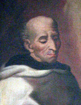 Фрагмент картины. Автор неизвестен. Изображен блаженный Ангел (в миру Франциск Паоли).